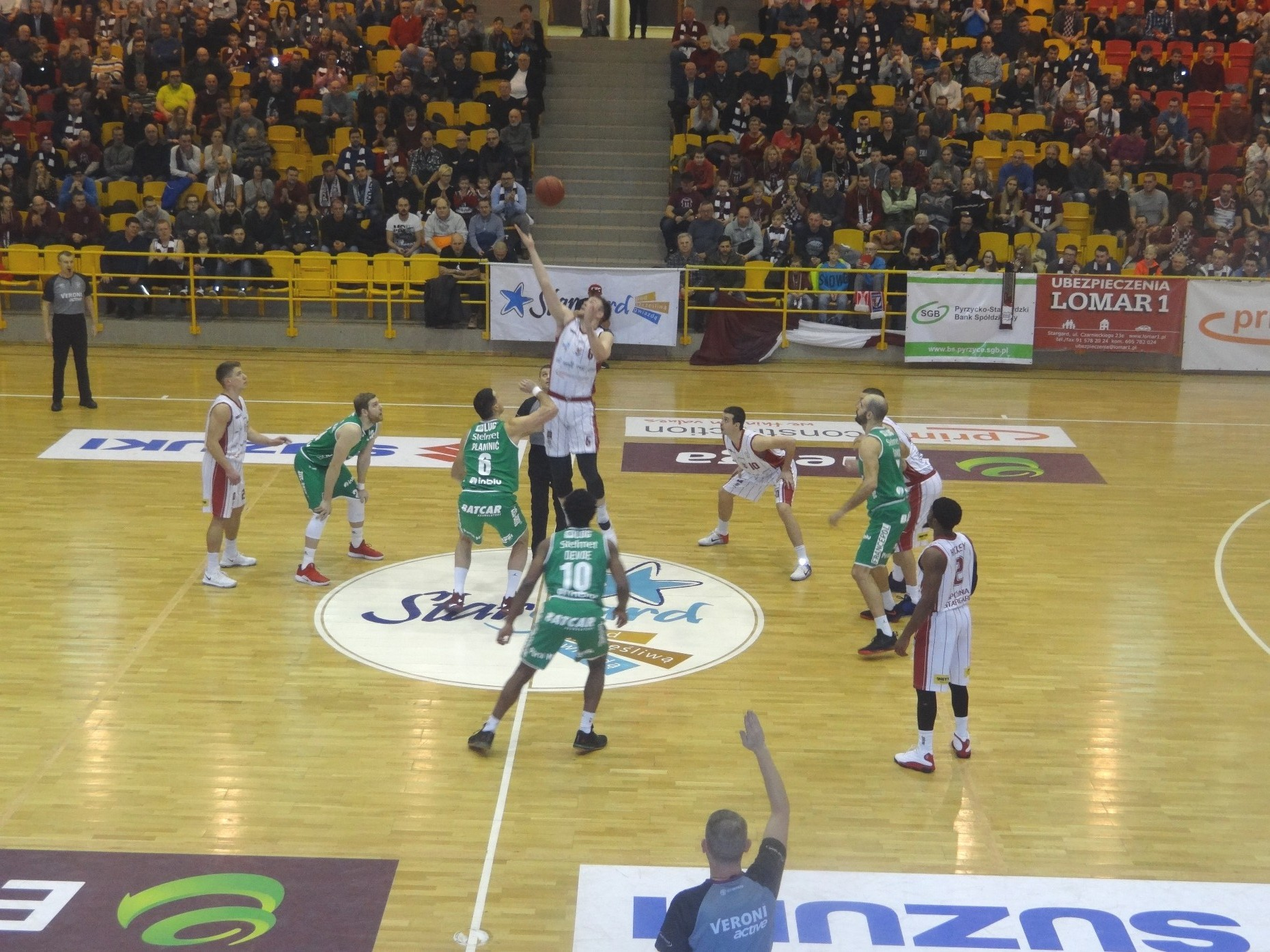 Mecz w stargardzie Spójnia - Zastal (16.12.2018)